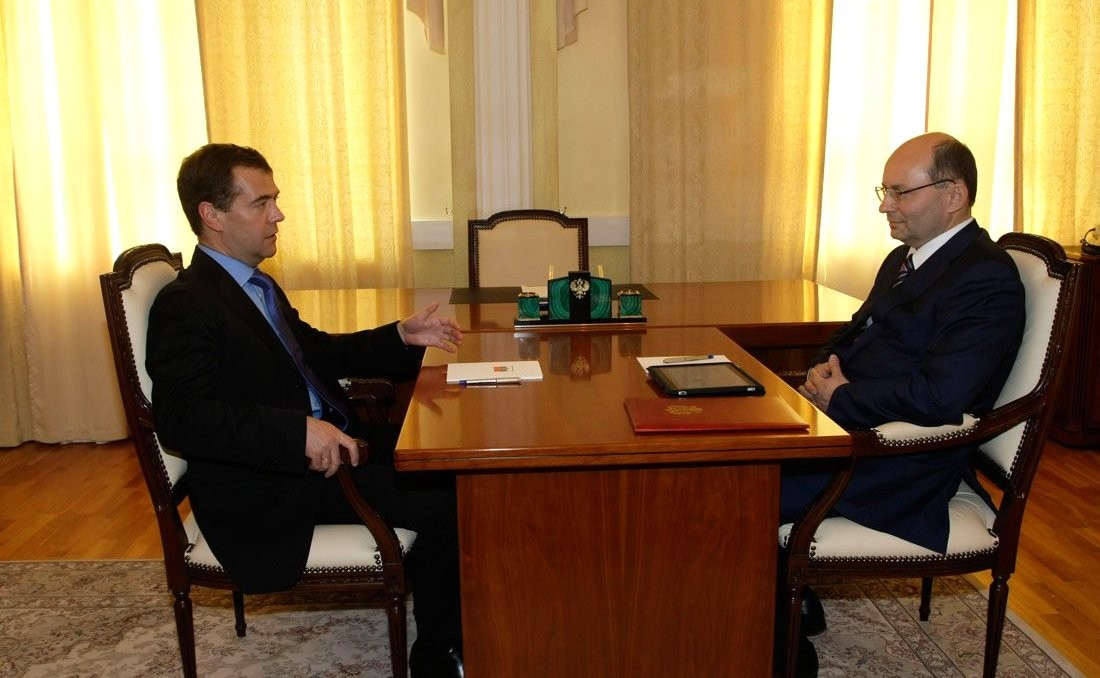 Рабочая встреча Дмитрия Медведева и Александра Мишарина